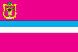 Прапор Оріхівського району